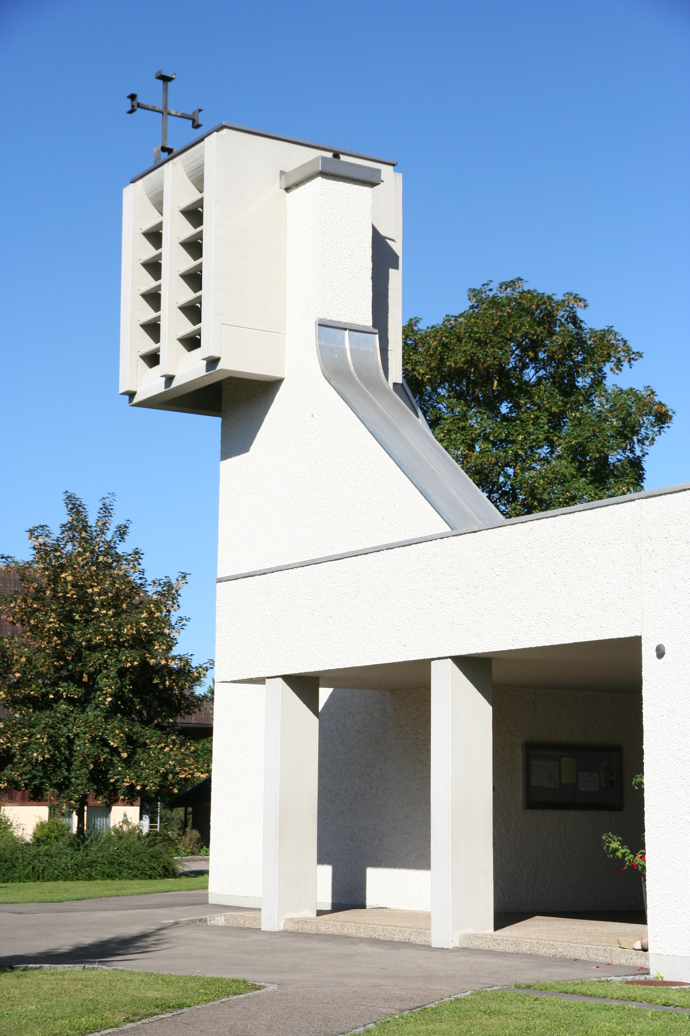 Röm.-kath. Kirche St. Josef in Matzingen